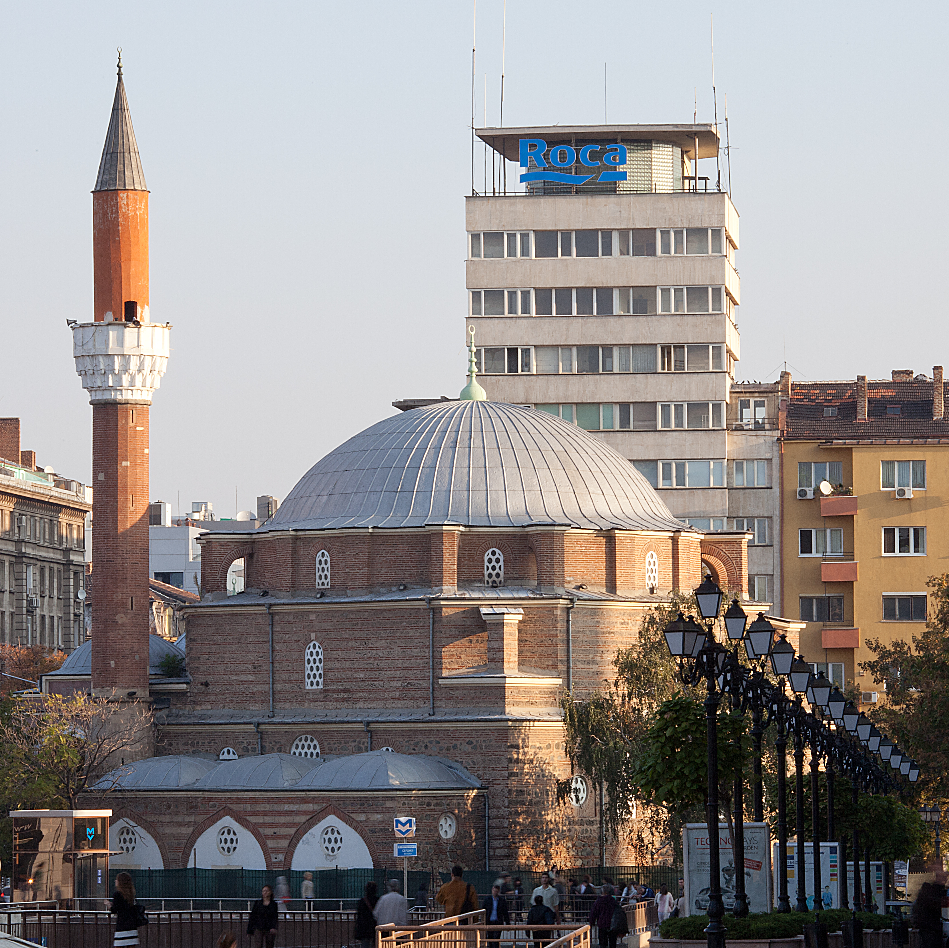 Banya Bashi Moschee (Große Bad-Moschee), Sofia